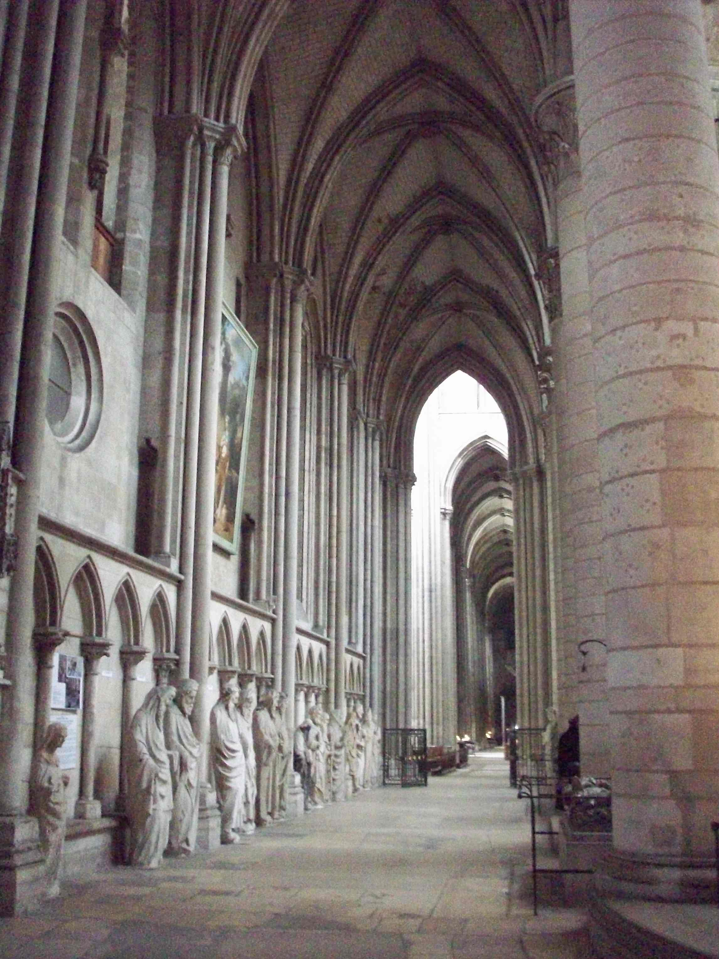 Déambulatoire de la cathédrale.